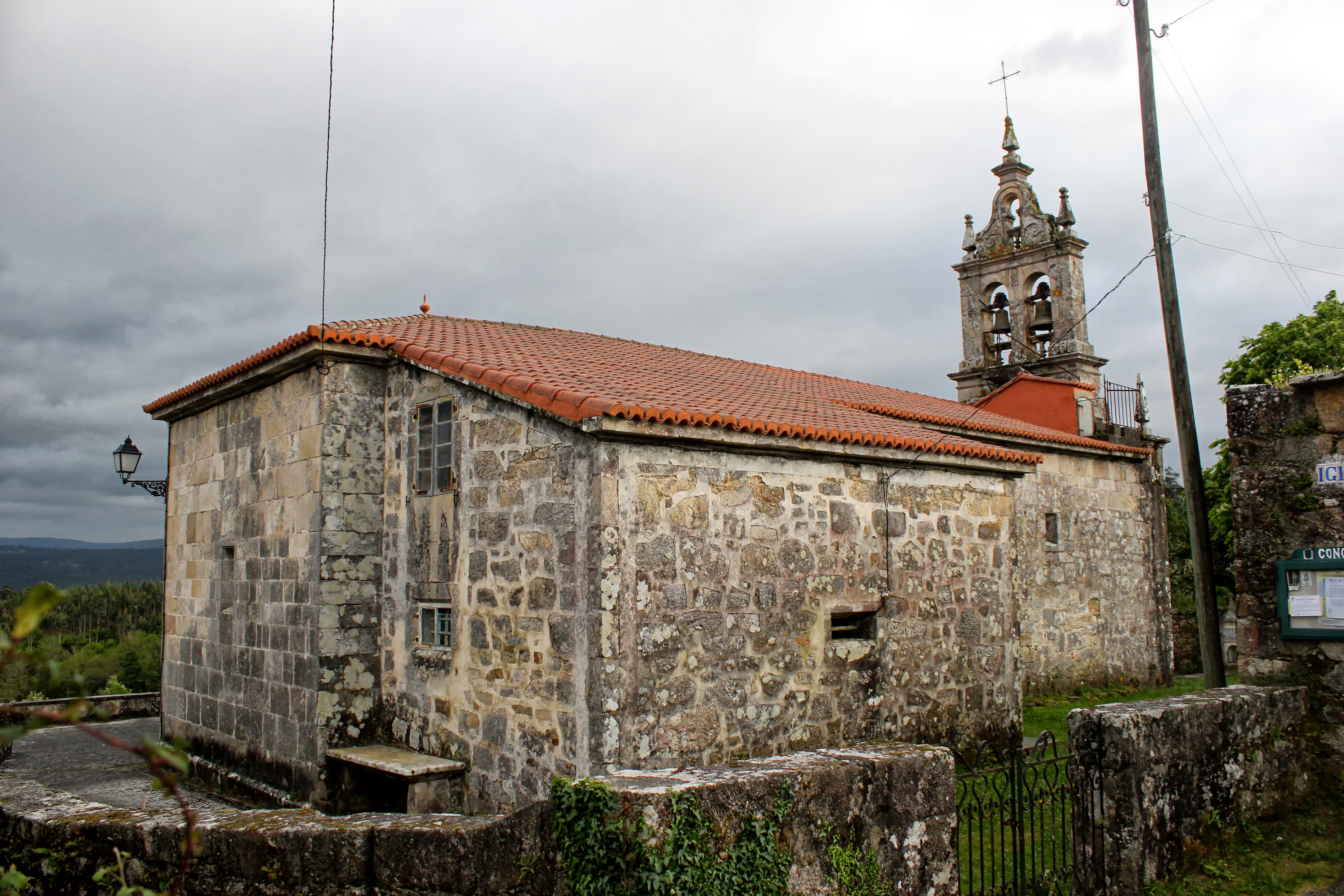 Igrexa de Merín, Vedra.